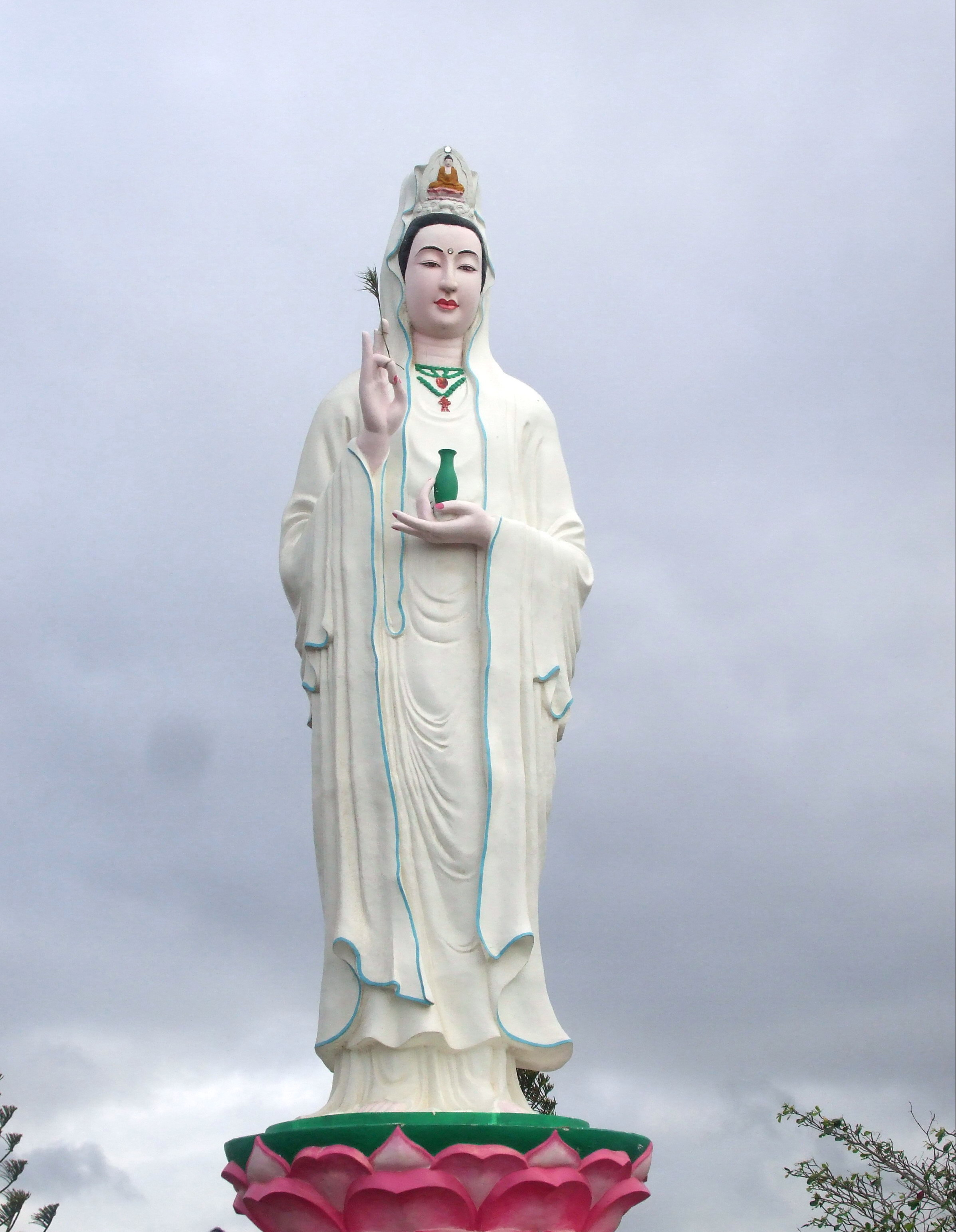 Tượng Quán Thế Âm được xây dựng từ năm 1973 và hoàn thành vào đầu năm 1975. Tượng cao 11m, đứng trang nghiêm bên bờ biển Đông, thuộc phường Nhà Mát, TP. Bạc Liêu, Việt Nam.